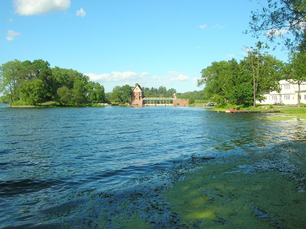 Jaz walcowy na torze regatowym w Bydgoszczy